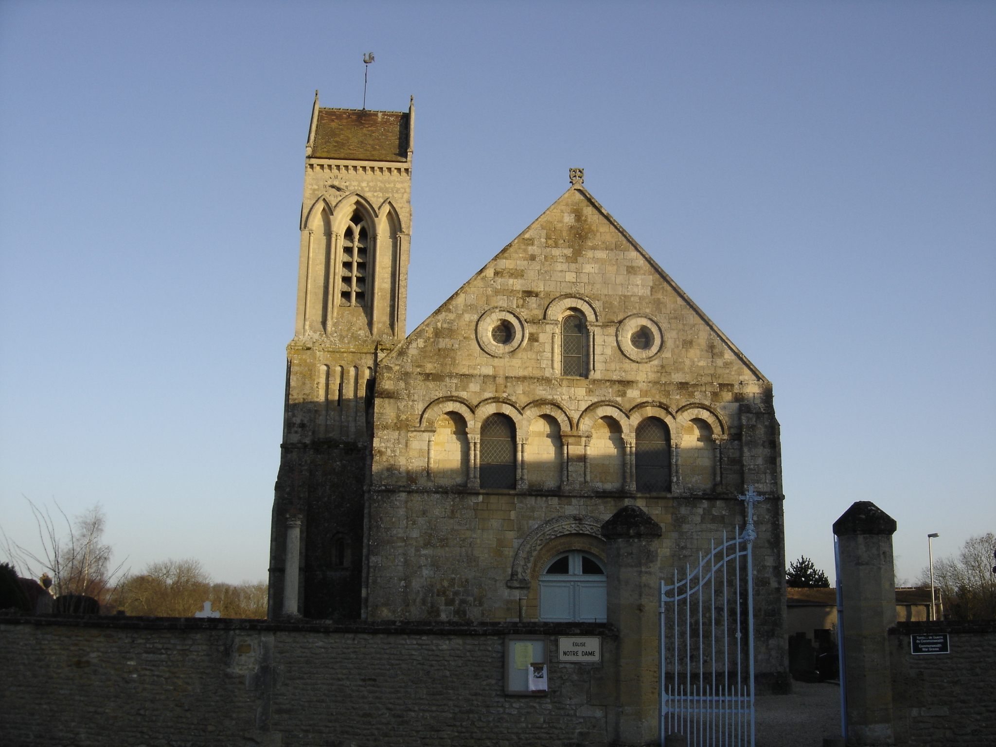 Église Notre-Dame de Biéville